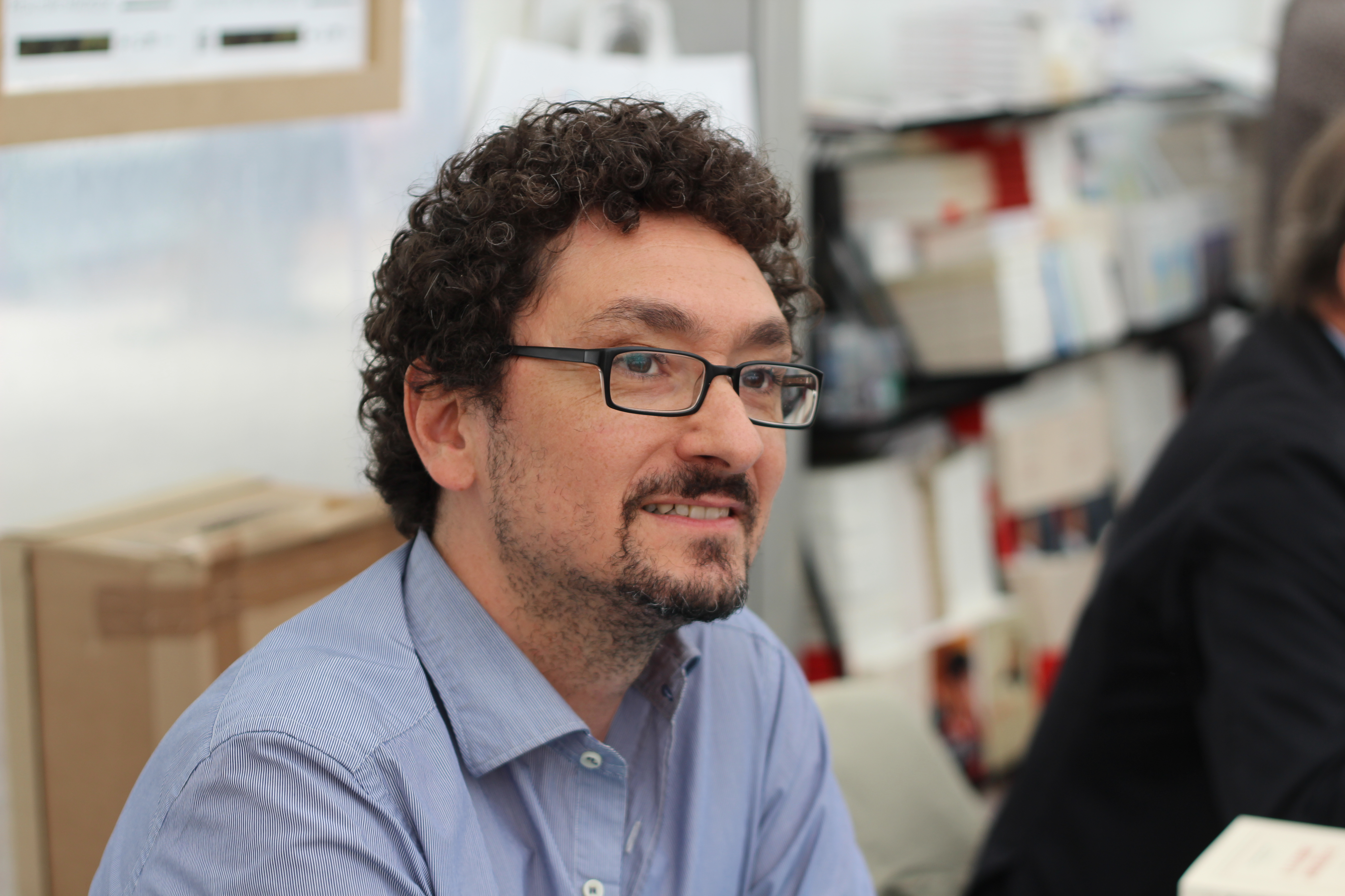 David Foenkinos - Livre sur la Place 2014